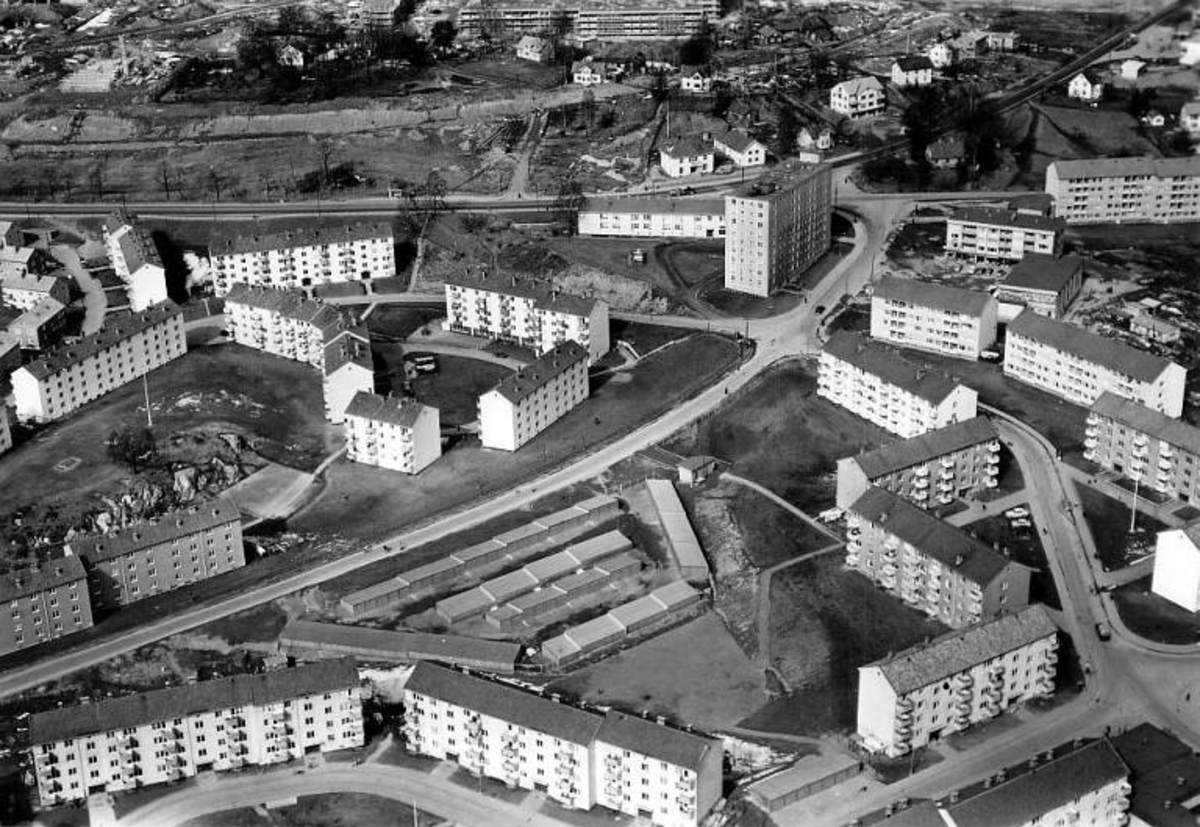 Nedre Kalbakkvei nedover fra Kalbakken. Foto: A.Schrøder/Widerø (1961). Fra Oslo byarkivs samling i Digitalt museum.